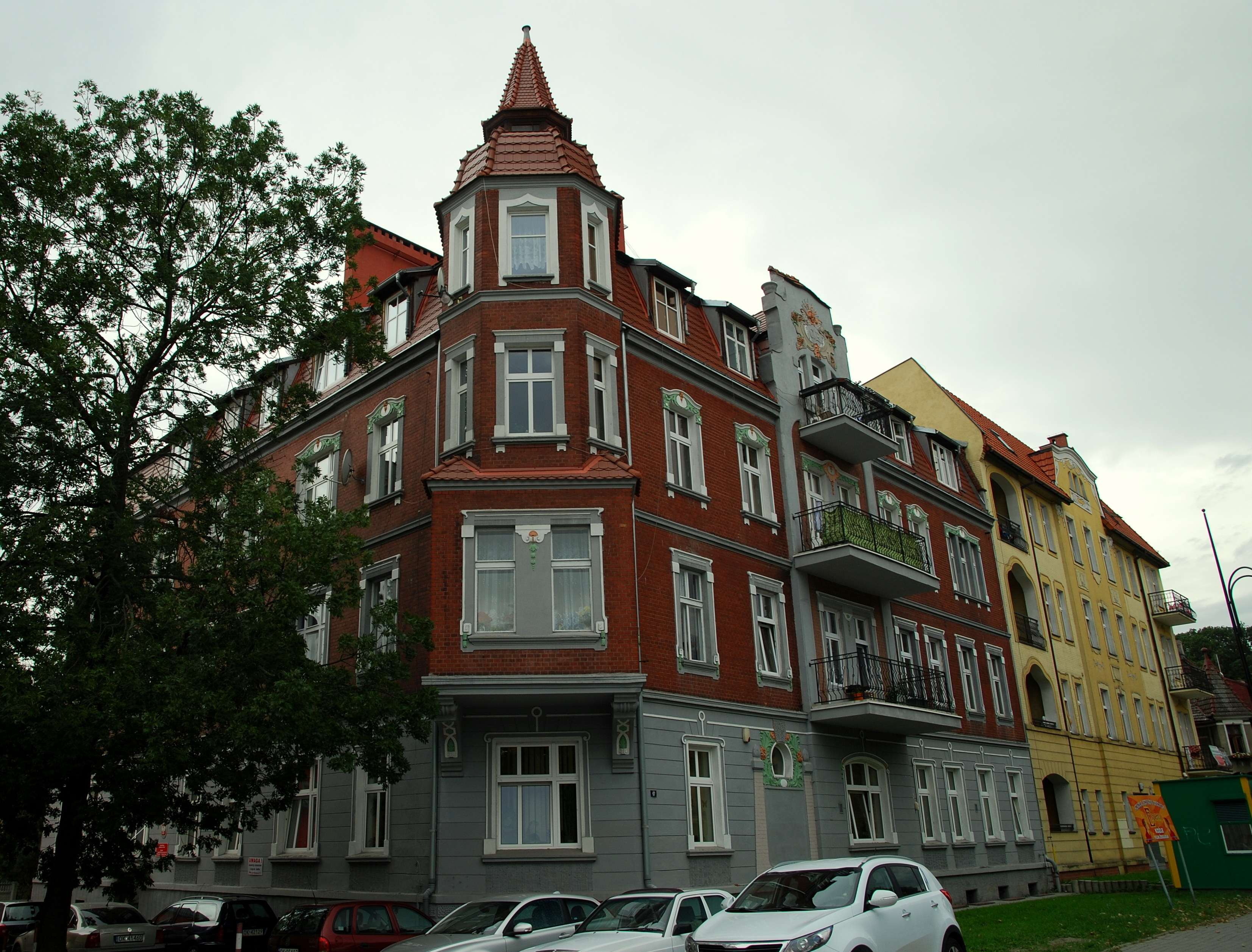 Kędzierzyn-Koźle budynek mieszkalny przy ul. Piastowskiej 17 OP